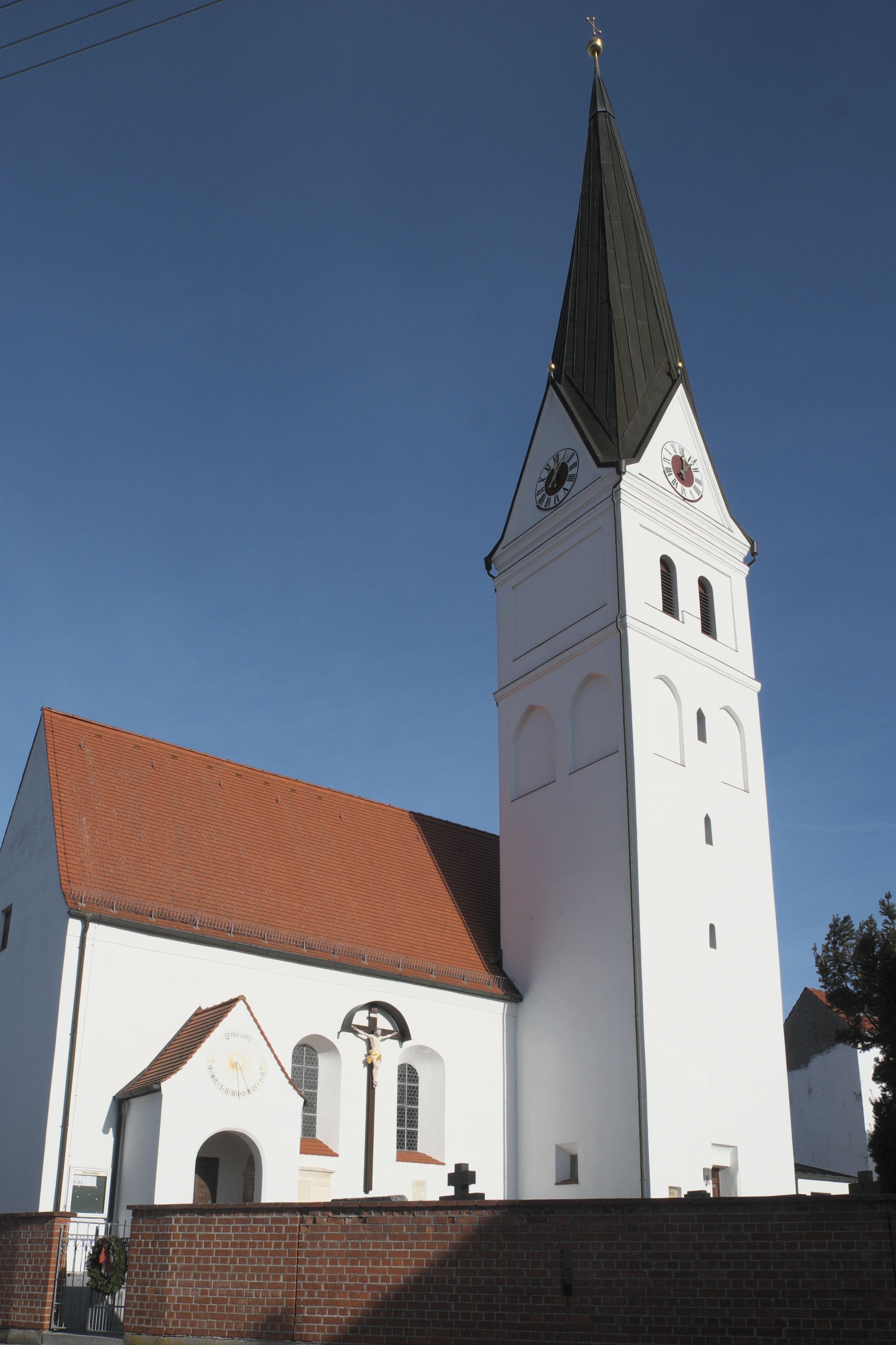 Katholische Pfarrkirche St. Margaretha in Königsfeld (Wolnzach) im Landkreis Pfaffenhofen an der Ilm (Bayern/Deutschland)